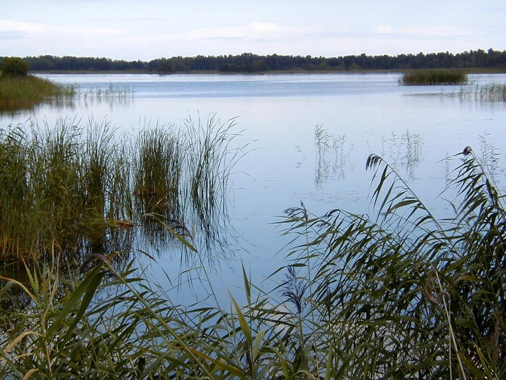 Kaņiera ezers